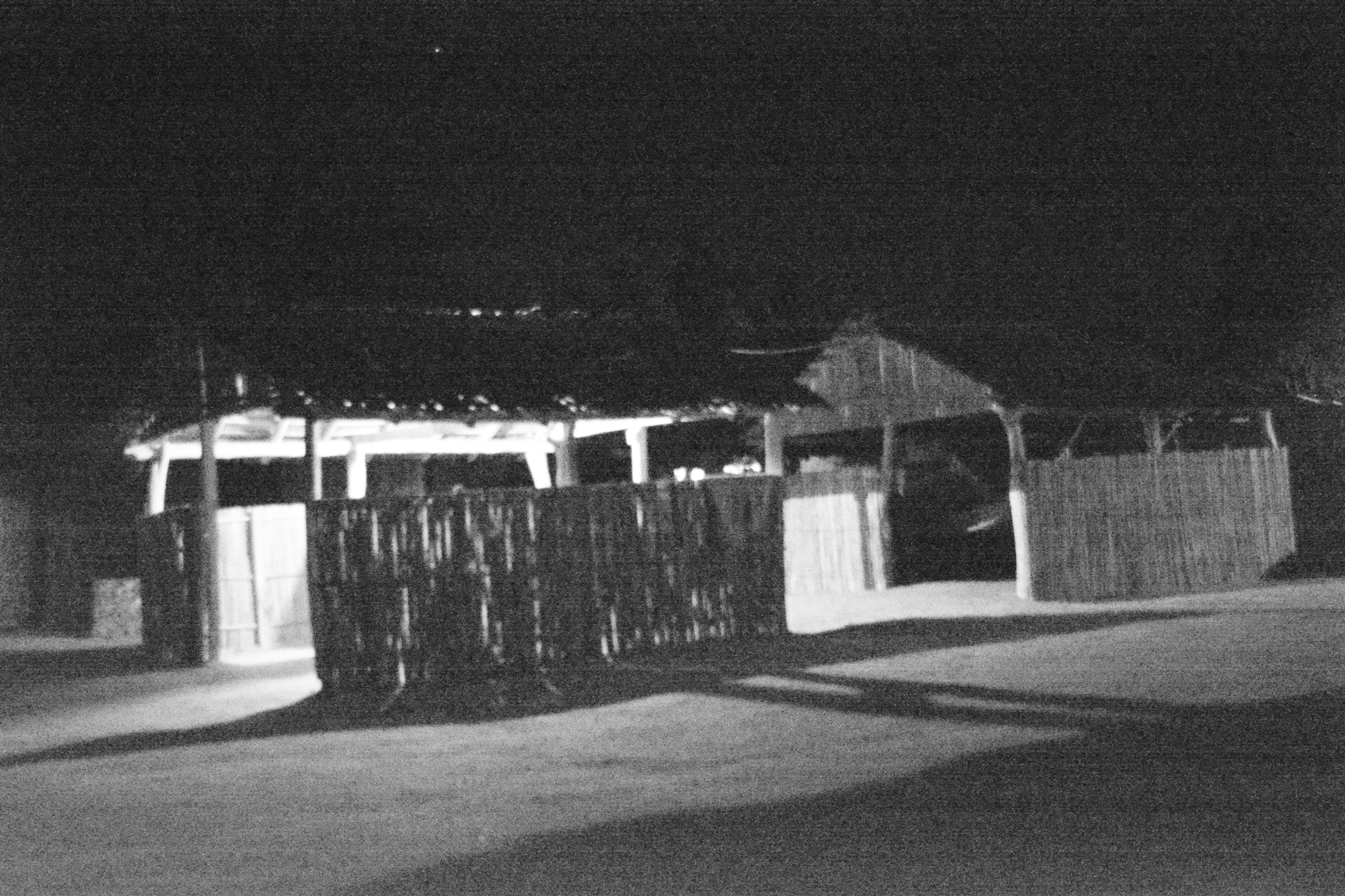 Esta fotografía fue tomada en el municipio colombiano con código 44847.